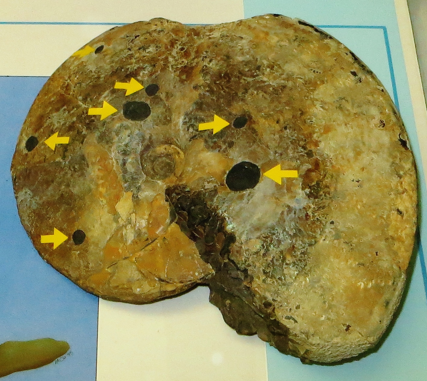 Fossil of Placenticeras- Took the picture at Museo di Storia Naturale, Milano